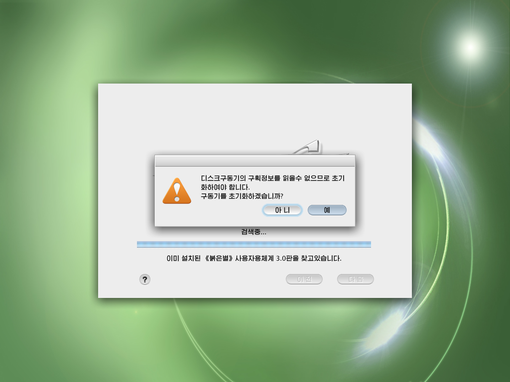 Screenshot des Betriebssystems Red Star OS. Dieser Screenshot zeigt den Installationsprozess.